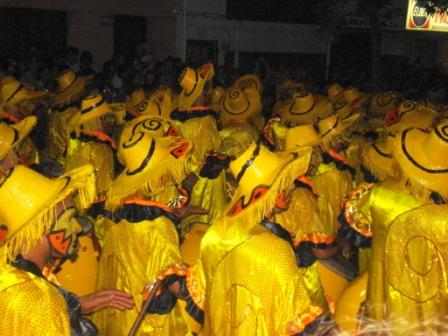 Desfile de la comparsa Elumbé en 2011.